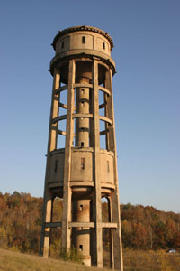 Wasserturm der Vereinigten Aluminium-Werke Lautawerk in Lauta